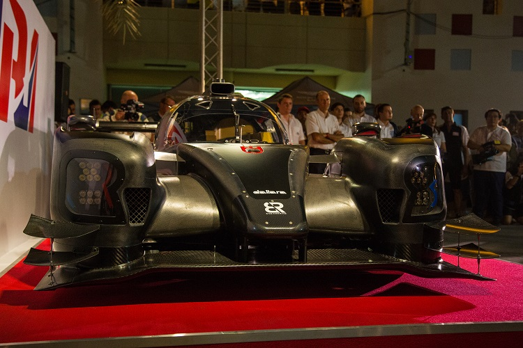 Ein Bild eines BR01 bei seiner Vorstellung bei einem WEC Rennen in Bahrain.